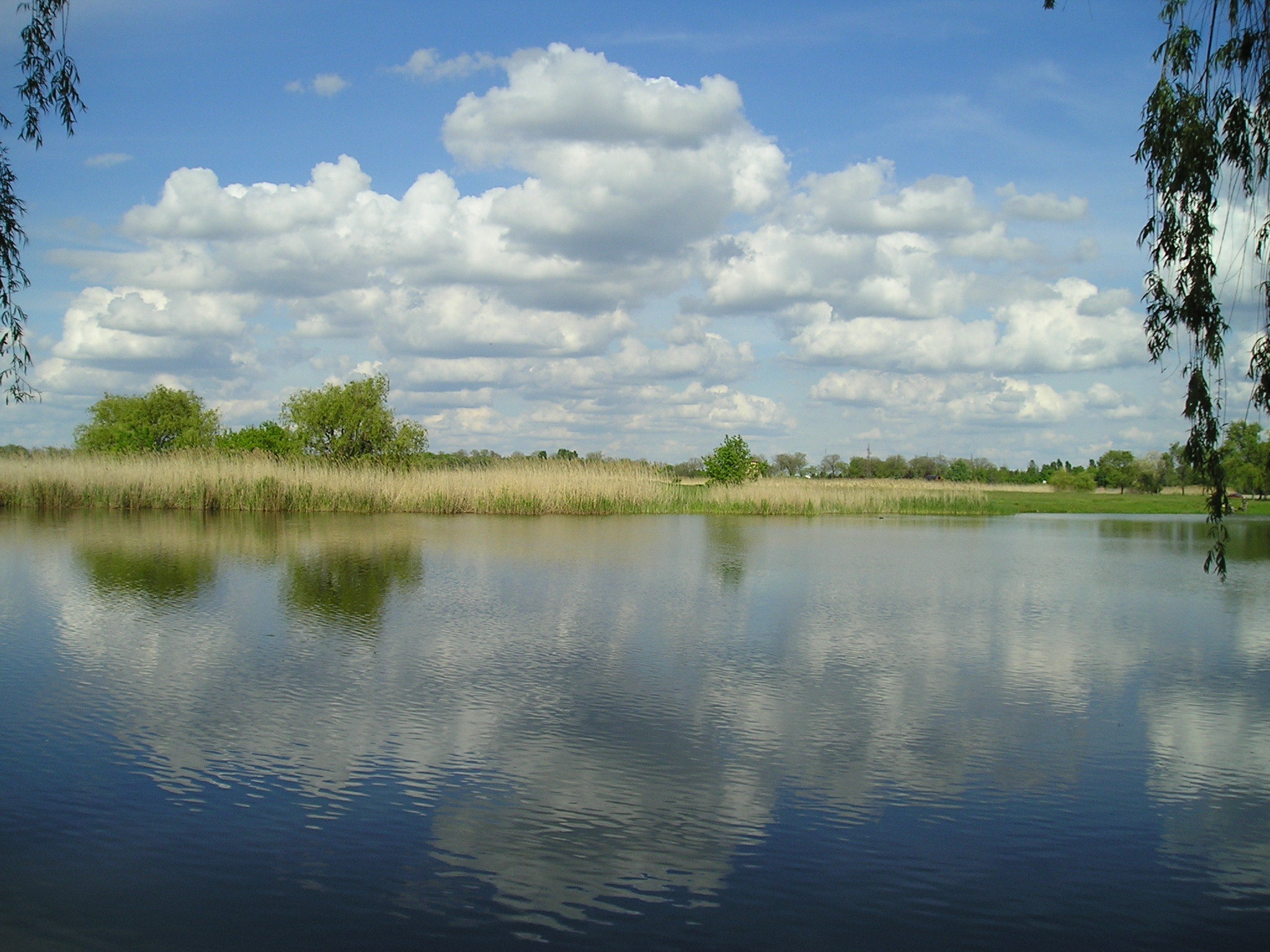 Zobnatica Lake near Backa Topola, Srbija, Serbia